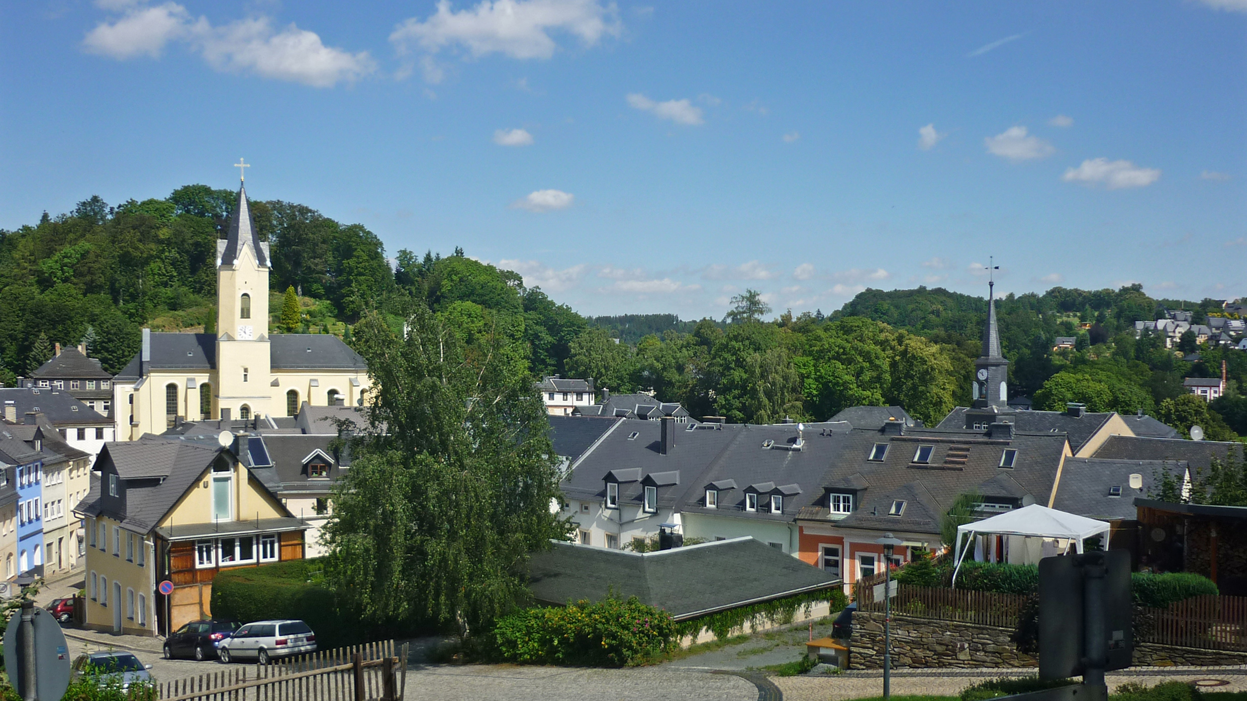 Blick auf Lobenstein (Thür.) mit Stadtkirche und Rathaus